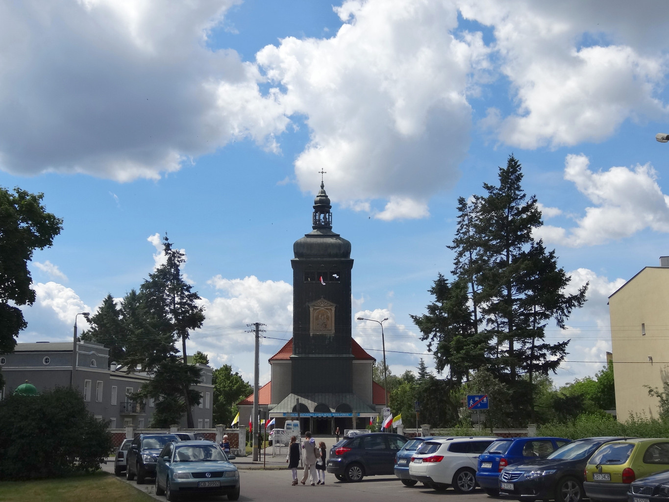 Osiedle Szwederowo w Bydgoszczy. Kościół parafialny pw. Matki Bożej Nieustającej Pomocy